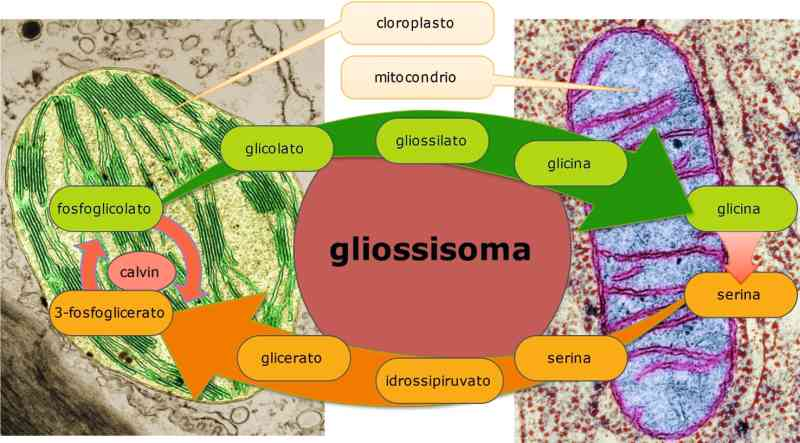 Focus sul ruolo fondamentale dei gliossisimoi per il trasporto di sostanze metaboliche tra perossisomi e cloroplasi, in ambedue le direzioni. Comunemente chiamato ciclo del gliossilato.